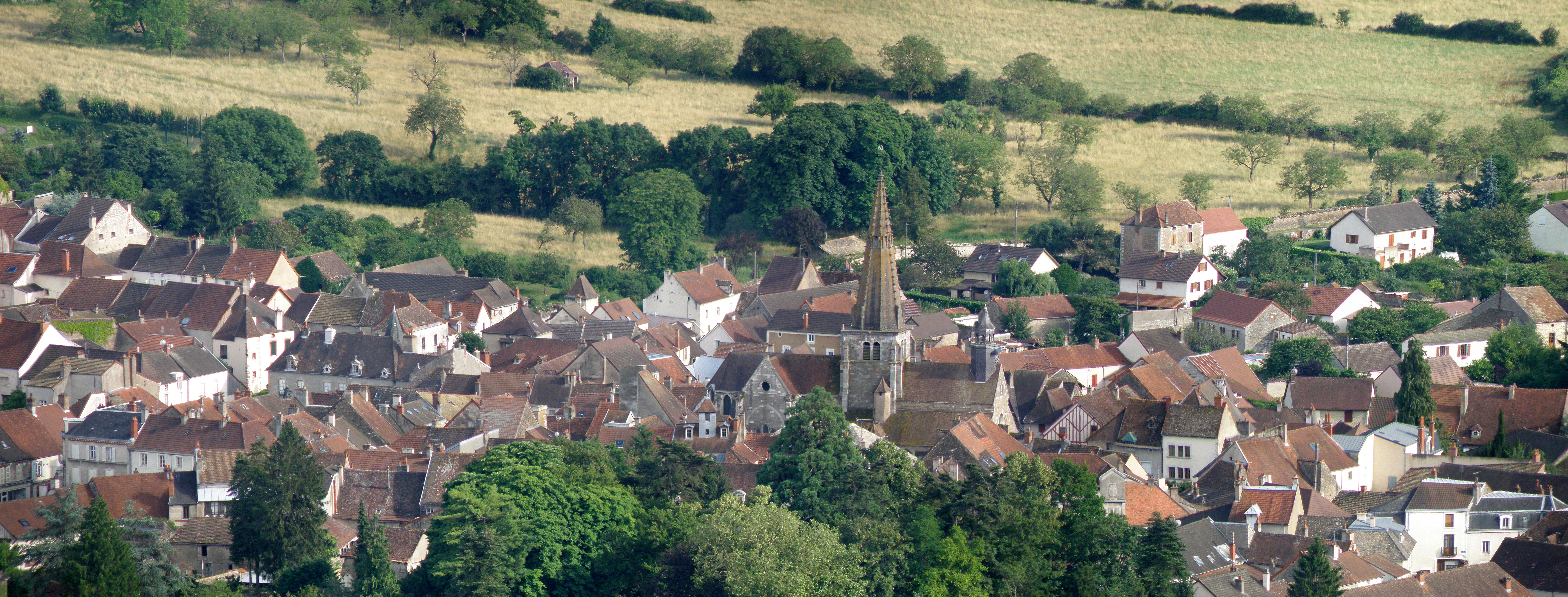 Nolay (Côte-d'Or, France). Vue générale prise depuis la falaise de la Chaume des Buis. Nous regardons vers le sud-est.